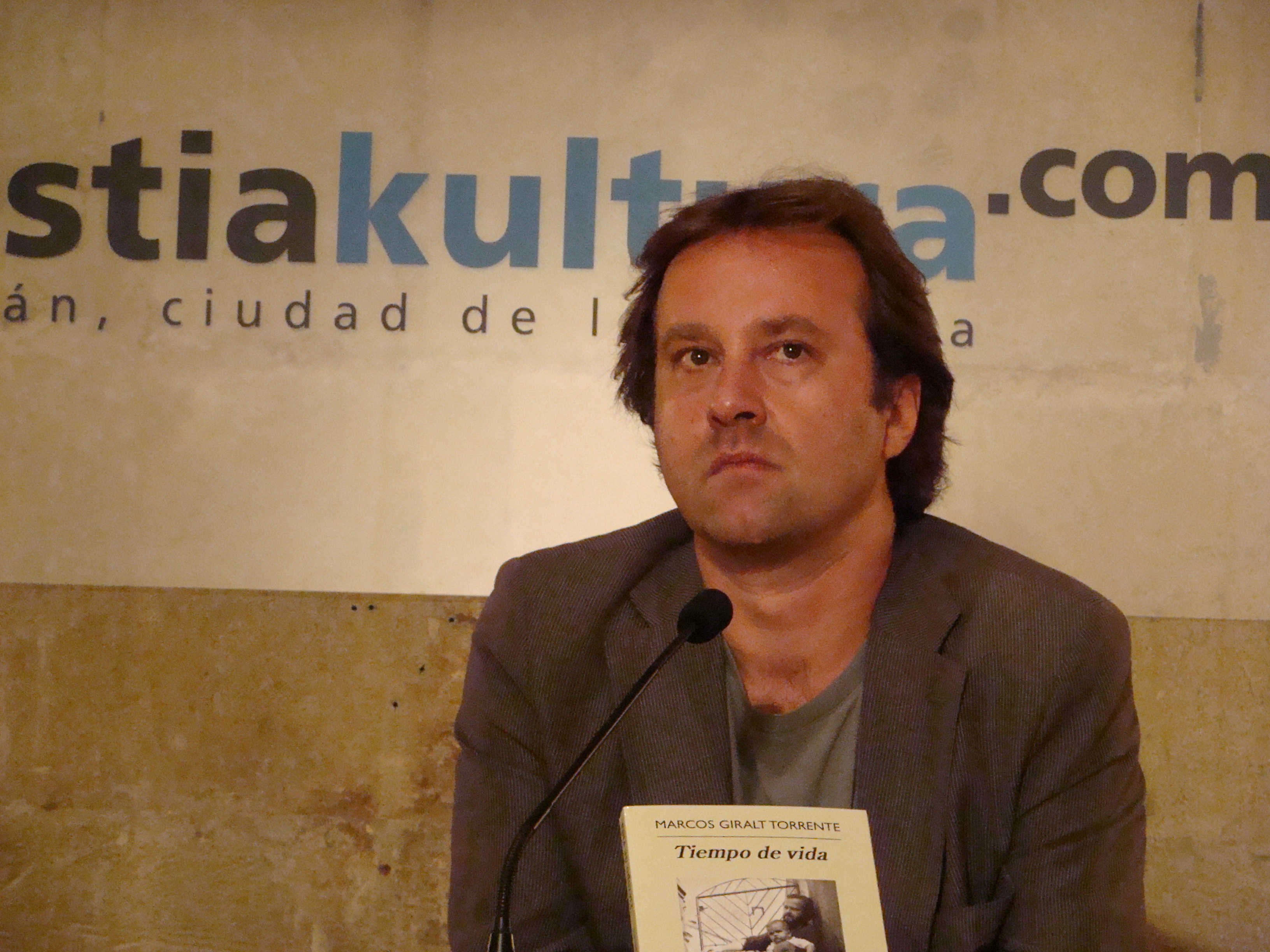 Tiempo de vida (Marcos Giralt)